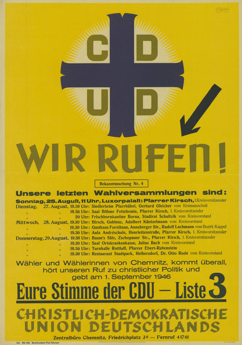 CDUD Wir rufen! Bekanntmachung Nr. 4 Unsere letzten Wahlversammlungen sind: ... spricht ... Wähler und Wählerinnen von Chemnitz, kommt überall hört unseren Ruf zu christlicher Politik und gebt am 1. September 1946 Eure Stimme der CDU - Liste 3 Christlich-Demokratische Union Deutschlands Zentralbüro Chemnitz ...Kommentar:Plakat von den Gemeindewahlen in Sachsen am 1.9.1946Plakatart:AnkündigungsplakatKünstler_Grafiker:Willy Petzold, DresdenAuftraggeber:CDUD Zentralbüro ChemnitzDrucker_Druckart_Druckort:223 900 846 Buchdruckerei Paul Schreyer Aktiengesellschaft für Kunstdruck, Niedersedlitz bei Dresden. LD 1 7.6 100000Objekt-Signatur:10-024 : 187Bestand:Plakate aus der SBZ/DDR (10-024)GliederungBestand10-18:Ost-CDU / CDUD / Exil-CDULizenz:KAS/ACDP 10-024 : 187 CC-BY-SA 3.0 DE